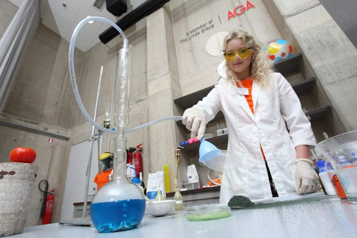 Vesilahusesse (toiduvärvidega) on pandud sublimeeruma tahket CO2 ehk kuiva jääd ning läbi püstjahuti ja vooliku kogusin gaasi seebimullidesse